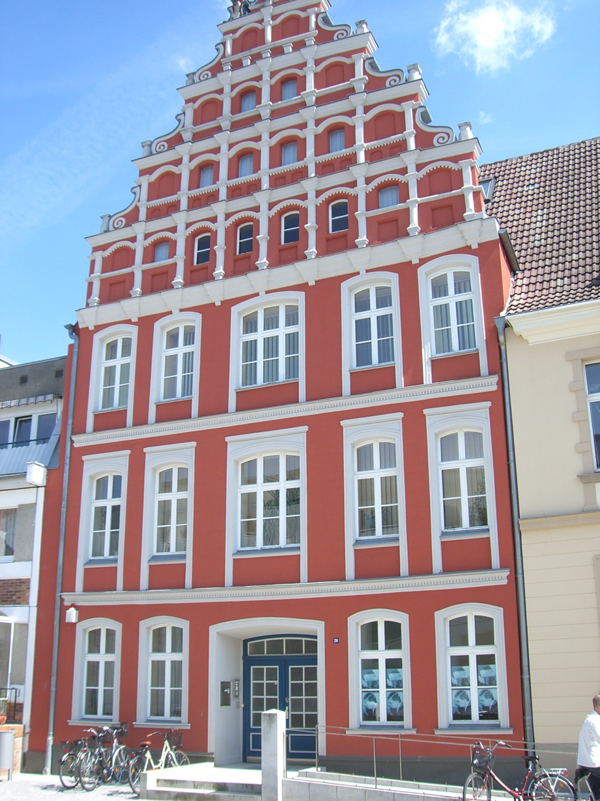 Greifswald